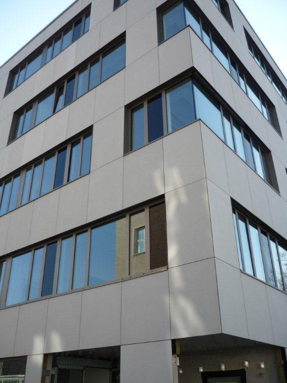 Neubau Institutsgebäude Bauingenieurwesen der Technischen Universität Dresden auf der Georg-Schumann-Straße 7a (S7A).